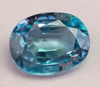 Blauer Zirkon, 3.36 ct, Kambodscha, hitzebehandelt